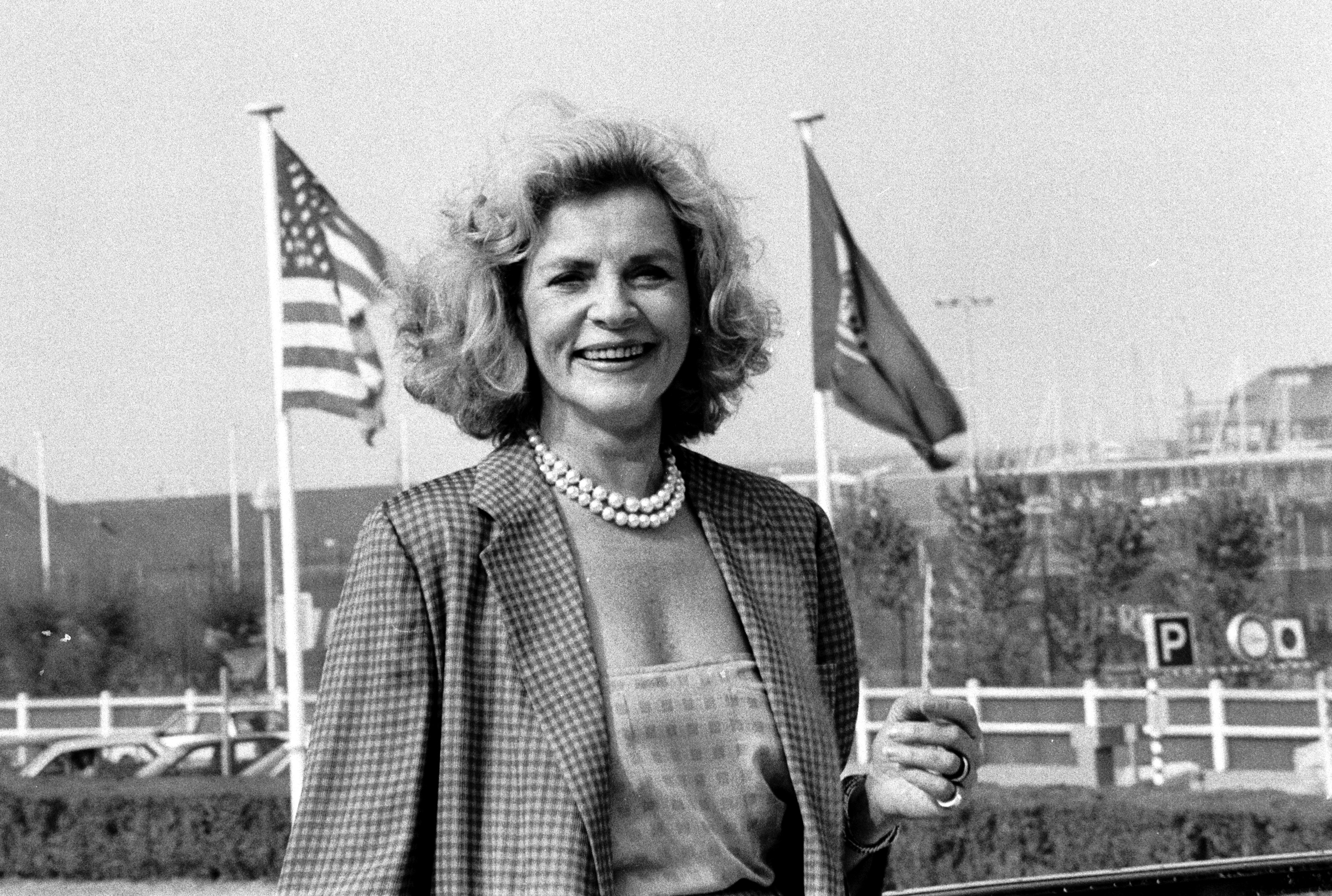 L'actrice américaine Lauren Bacall au Festival du cinéma américain de Deauville (Normandie, France).